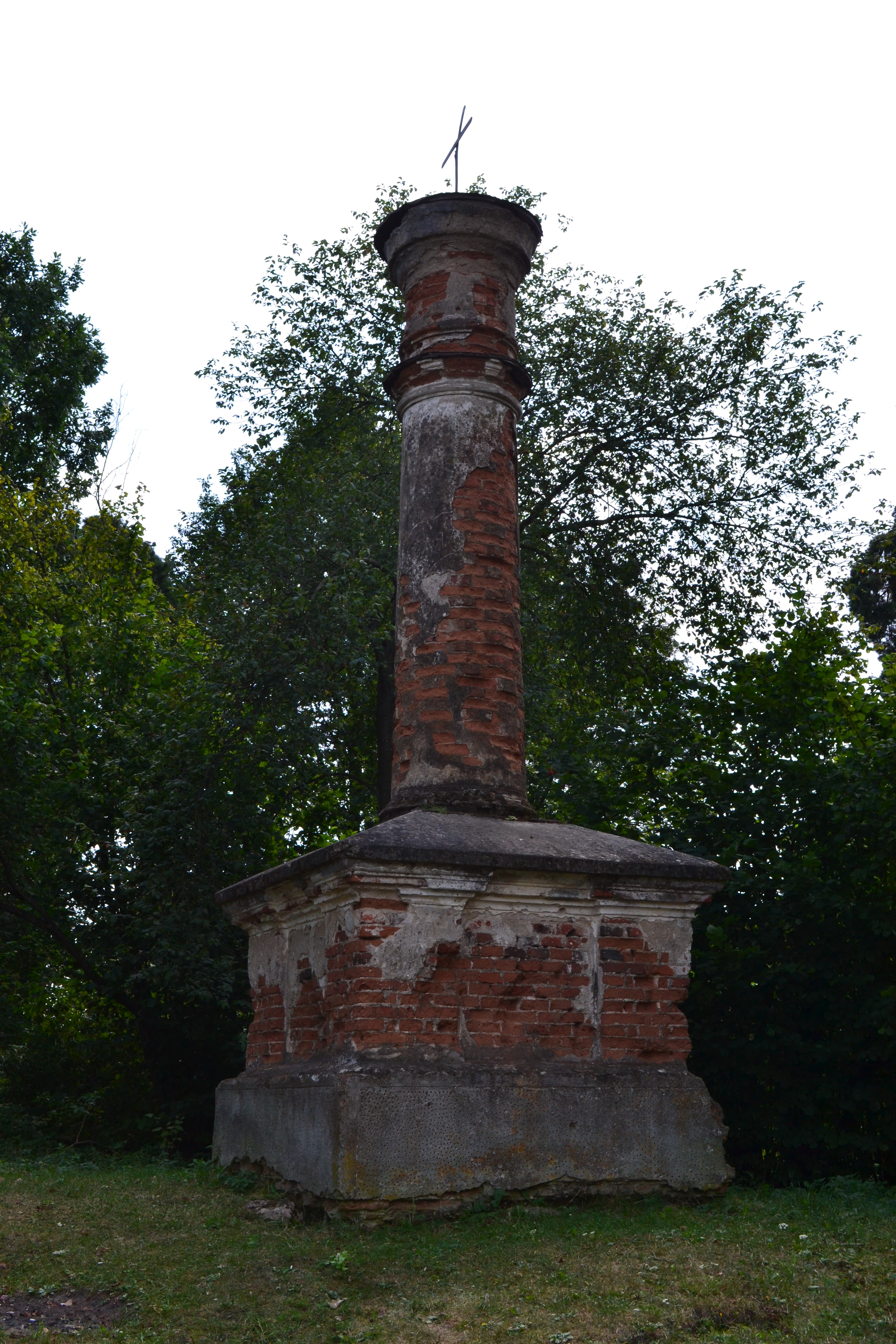 Беларуская (тарашкевіца): Памятны знак Канстытуцыі Рэчы Паспалітай 3 траўня 1791. Магілёўцы, Пружанскі раён